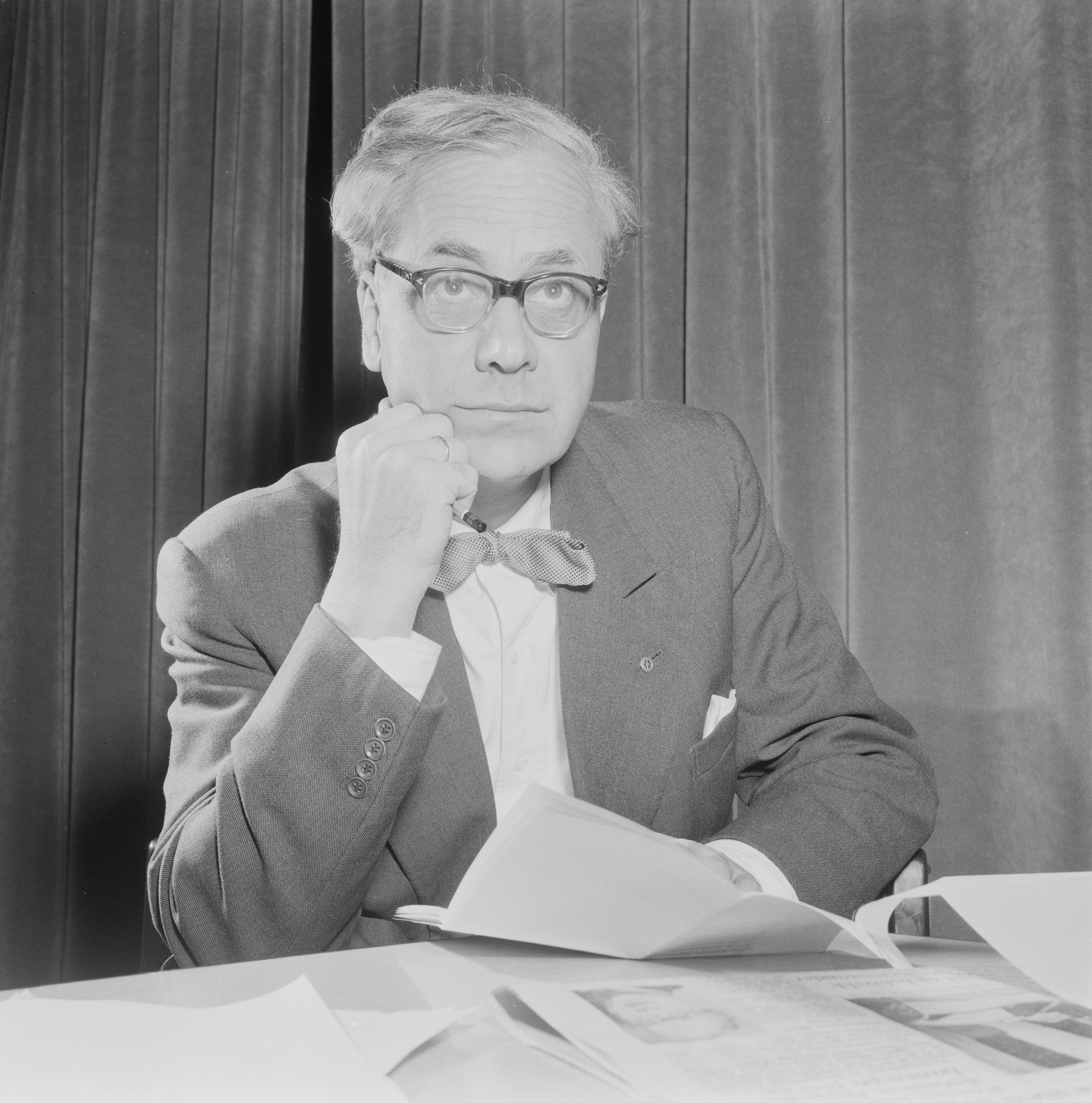 Bildet er hentet fra Arkivverket. Fritz C. Rieber, Bergensbanens forkortelse. NÅ nr. 22, 1954 Arkivinstitusjon : Riksarkivet Arkivnavn : Billedbladet NÅ Sted : Norge, Ukjent, Ukjent, Ukjent Emneord: Portretter, Menn Avbildet: Rieber, Fritz C